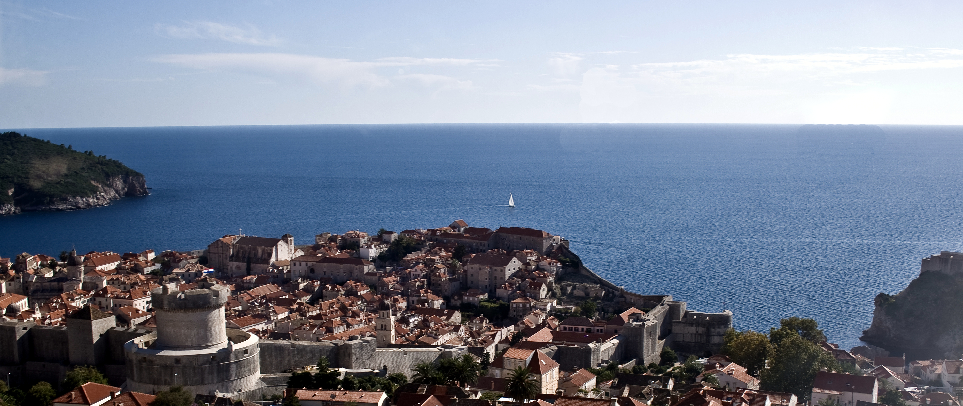 Dubrovnik